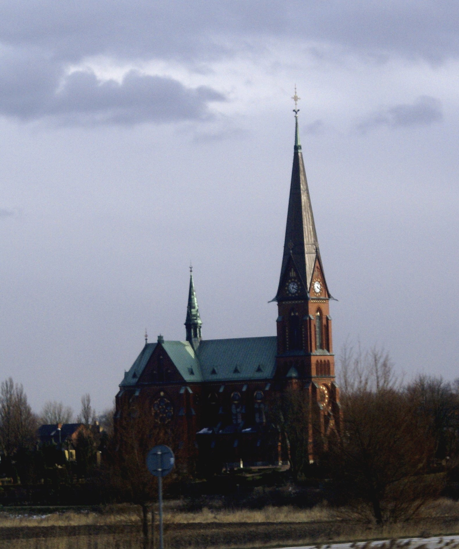 Asmundtorps kyrka in Asmundtorp, Skåne, Sweden